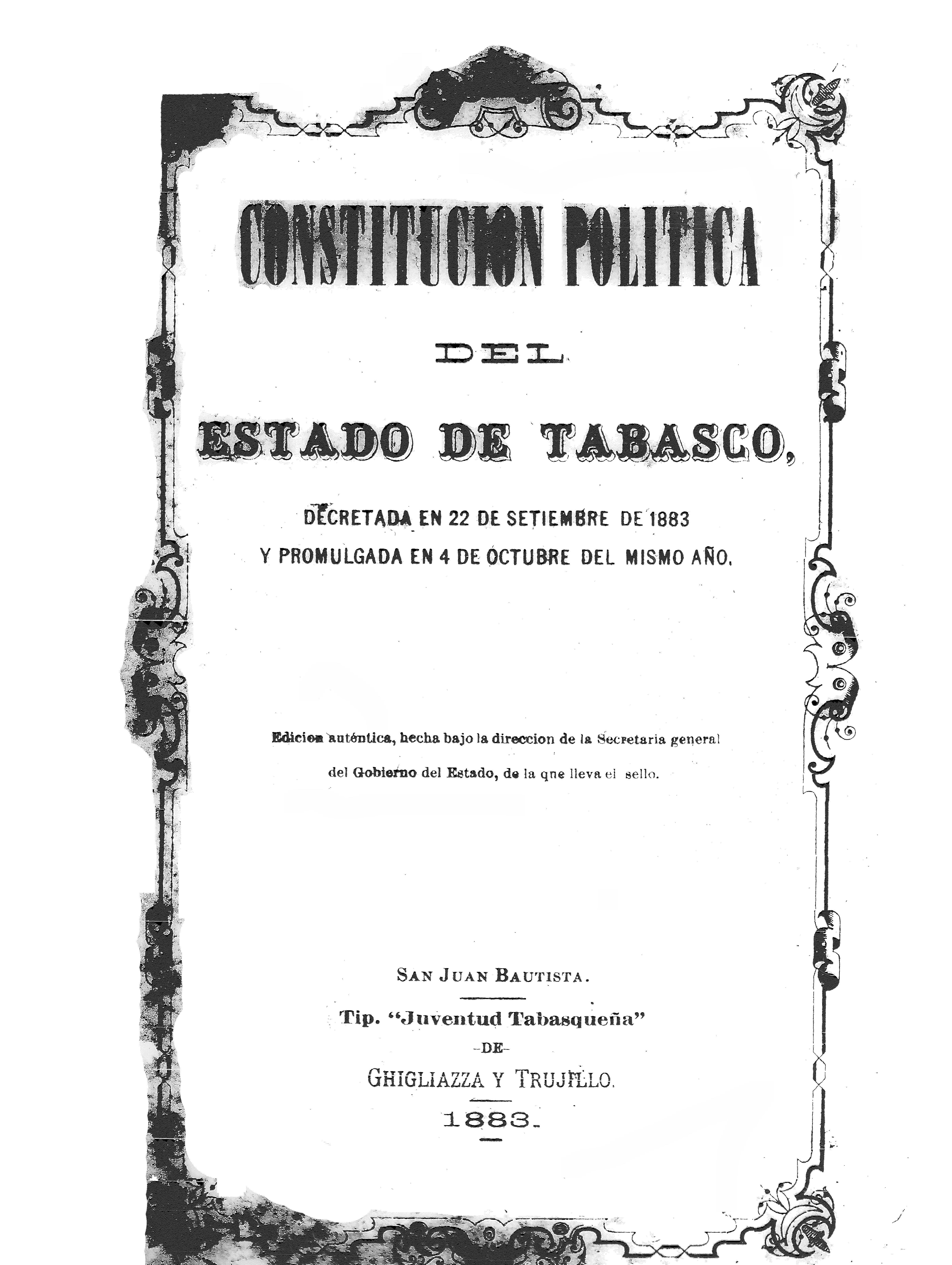 Portada de la quinta Constitución del Estado de Tabasco, decretada el 22 de septiembre de 1883 y promulgada el 4 de octubre del mismo año por el gobernador Manuel Mestre Gorgoll.